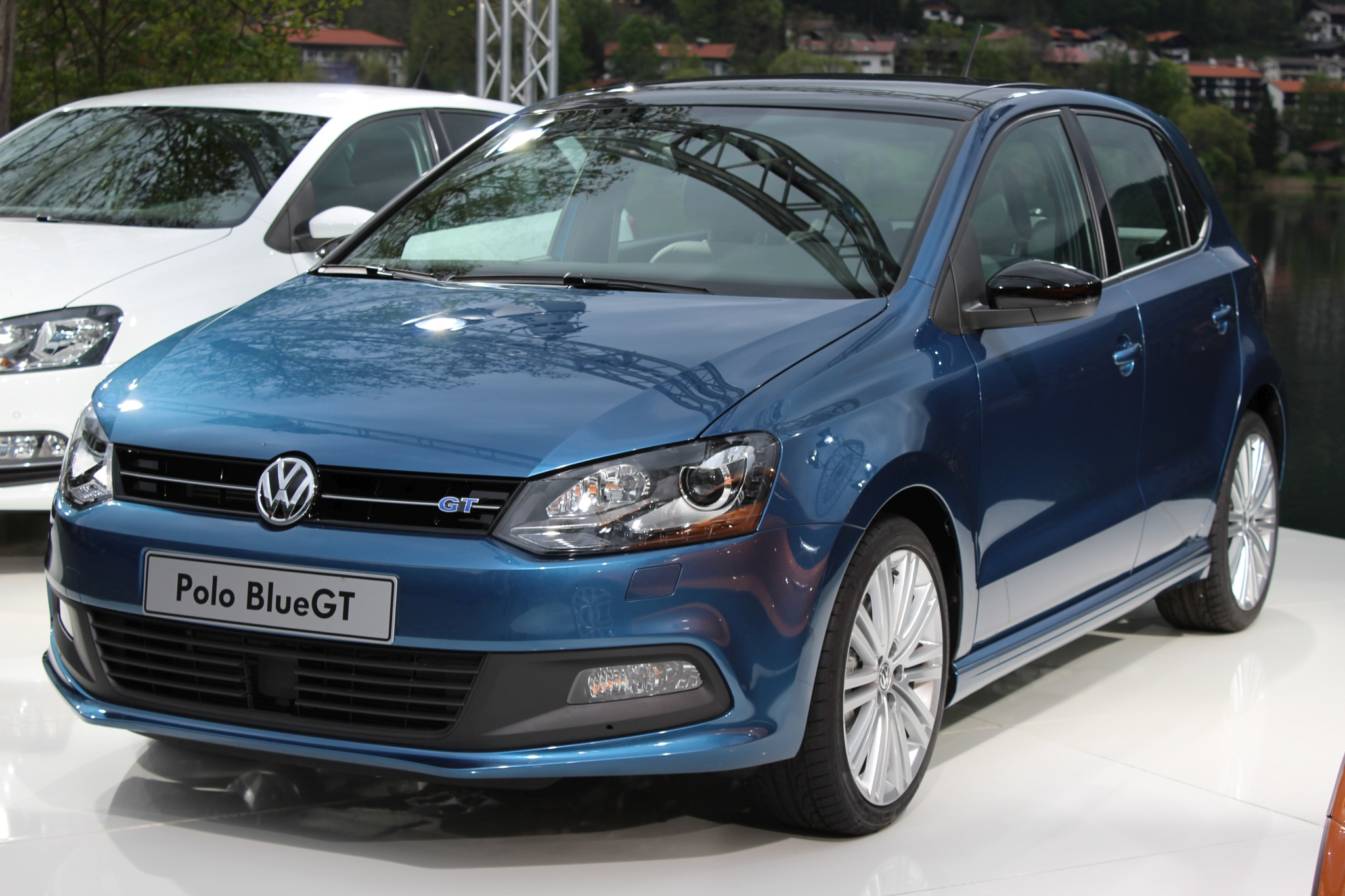 Facelift of VW Polo 2014 meistens gezeigt: VW Polo Bluemotion 1.2 TSI 7 Gang DSG Automatik 66 KW (9o PS) Ausstattungsvariant "Polo Fresh" (nur bis Ende 2014 verfügbar) Leergewicht 1.107 Kg max. 1.620 - 1.650 Kg Höchstgeschw. 186 KM/h Beschleunigung 7,1s oder 10,8 (Manuelle Schaltung / DSG)